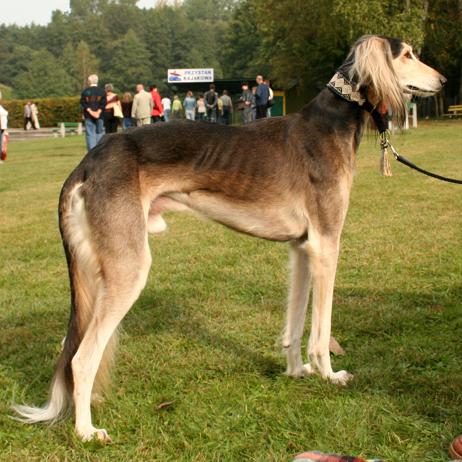 chart perski na krajowej wystawie w Rybniku - Kamieniu